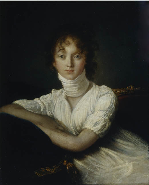 Countess Varvara Petrovna Shcherbatova, née Obolenskaya (1774-1843)label QS:Len,"Countess Varvara Petrovna Shcherbatova, née Obolenskaya (1774-1843)" label QS:Lru,"Щербатова Варвара Петровна (1774 – 1843), урождённая княжна Оболенская. Жена князя А. Ф. Щербатова."